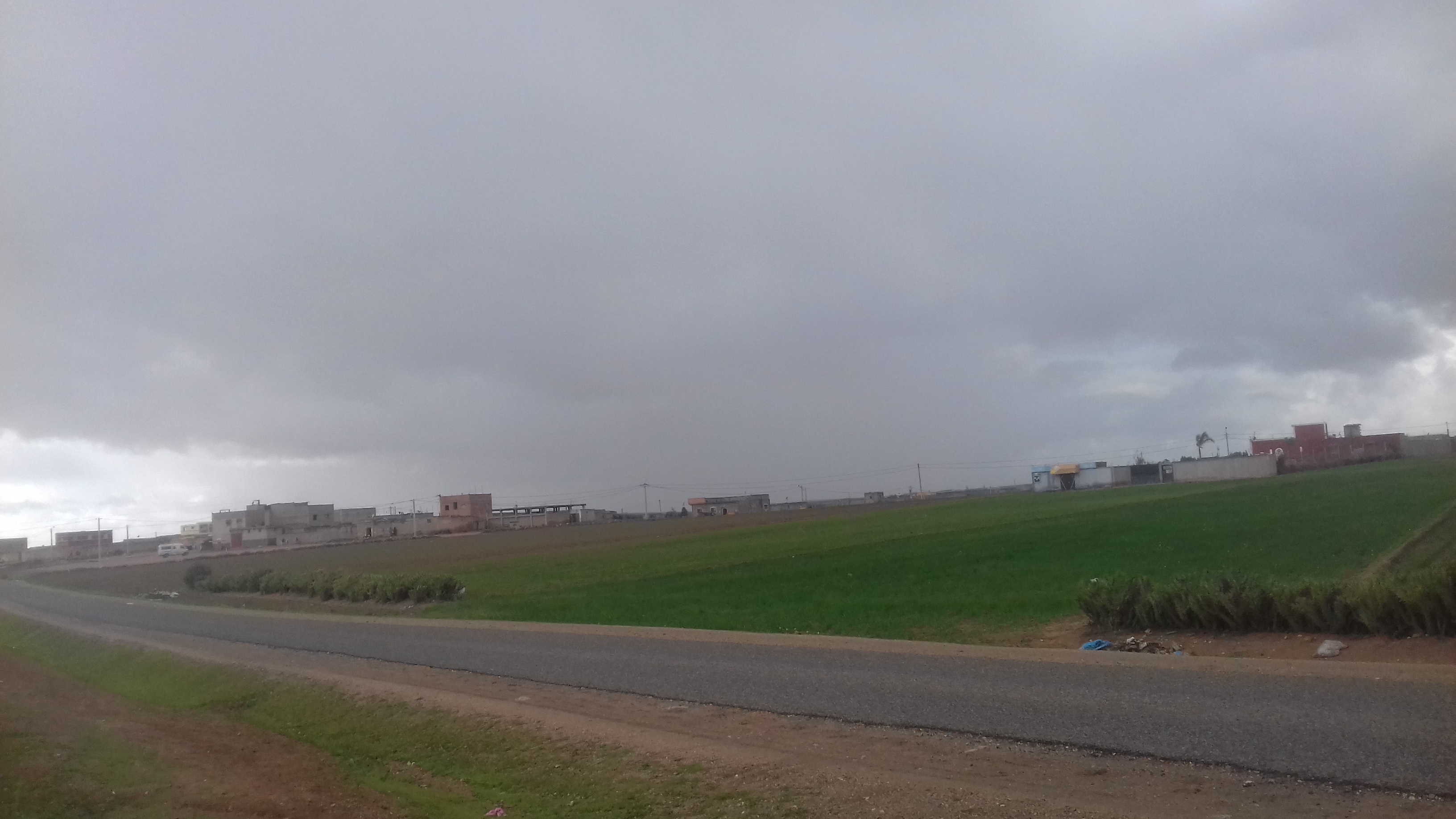 الطريق بين السبيتات وجماعته البريكيين